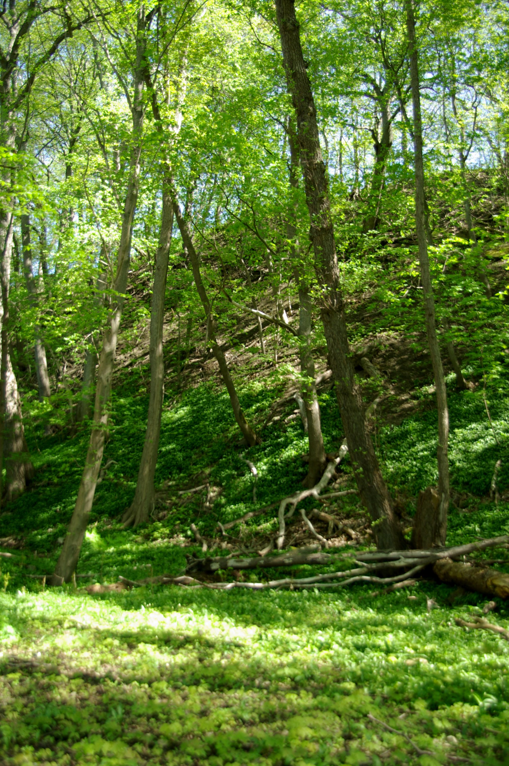 Haabneeme-klindiastangu maastikukaitseala